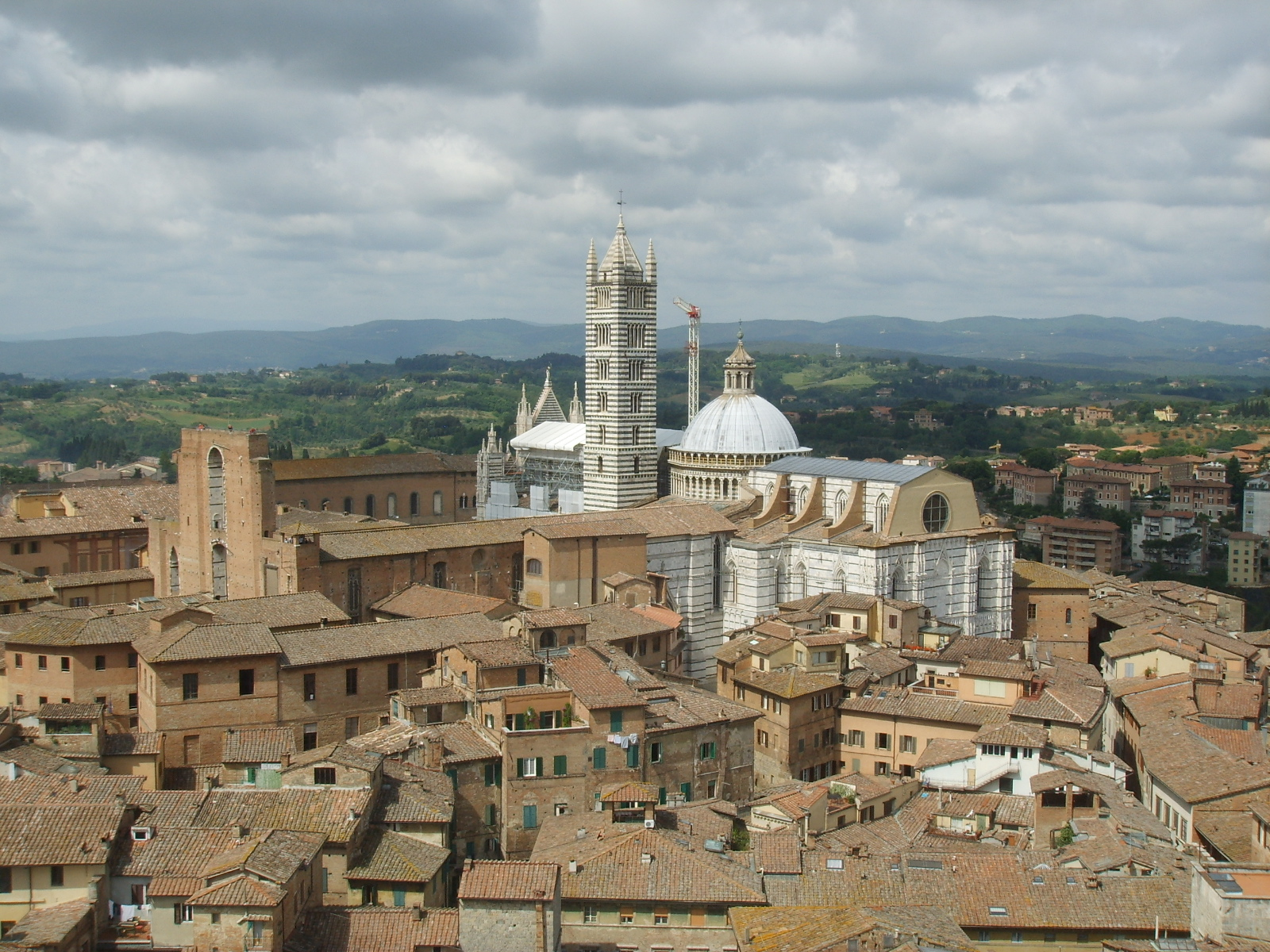 Duomo, view, siena